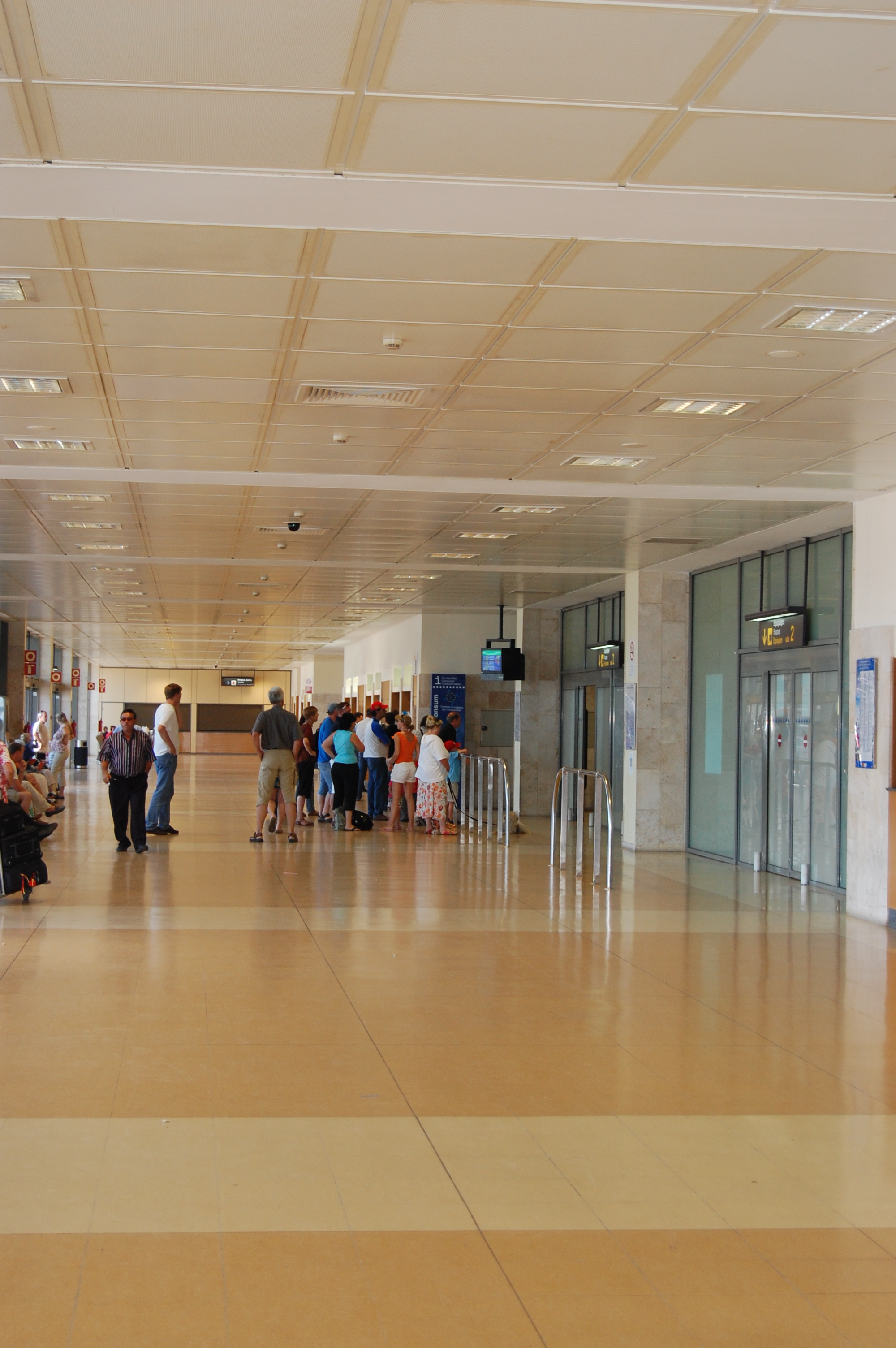 Aeroporto de Girona (Costa Brava), Catalunha, Espanha.